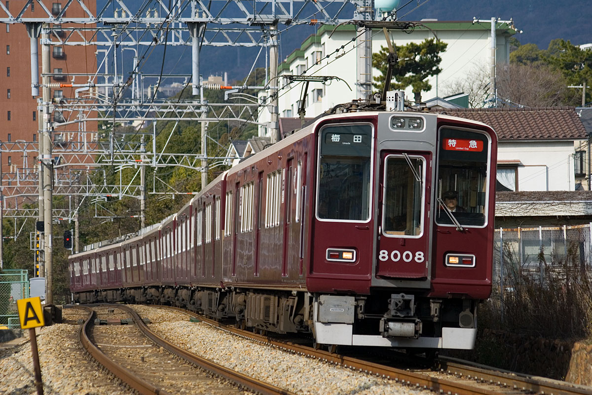 阪急電鉄8000系 8008F 御影〜岡本間にて 投稿者が撮影